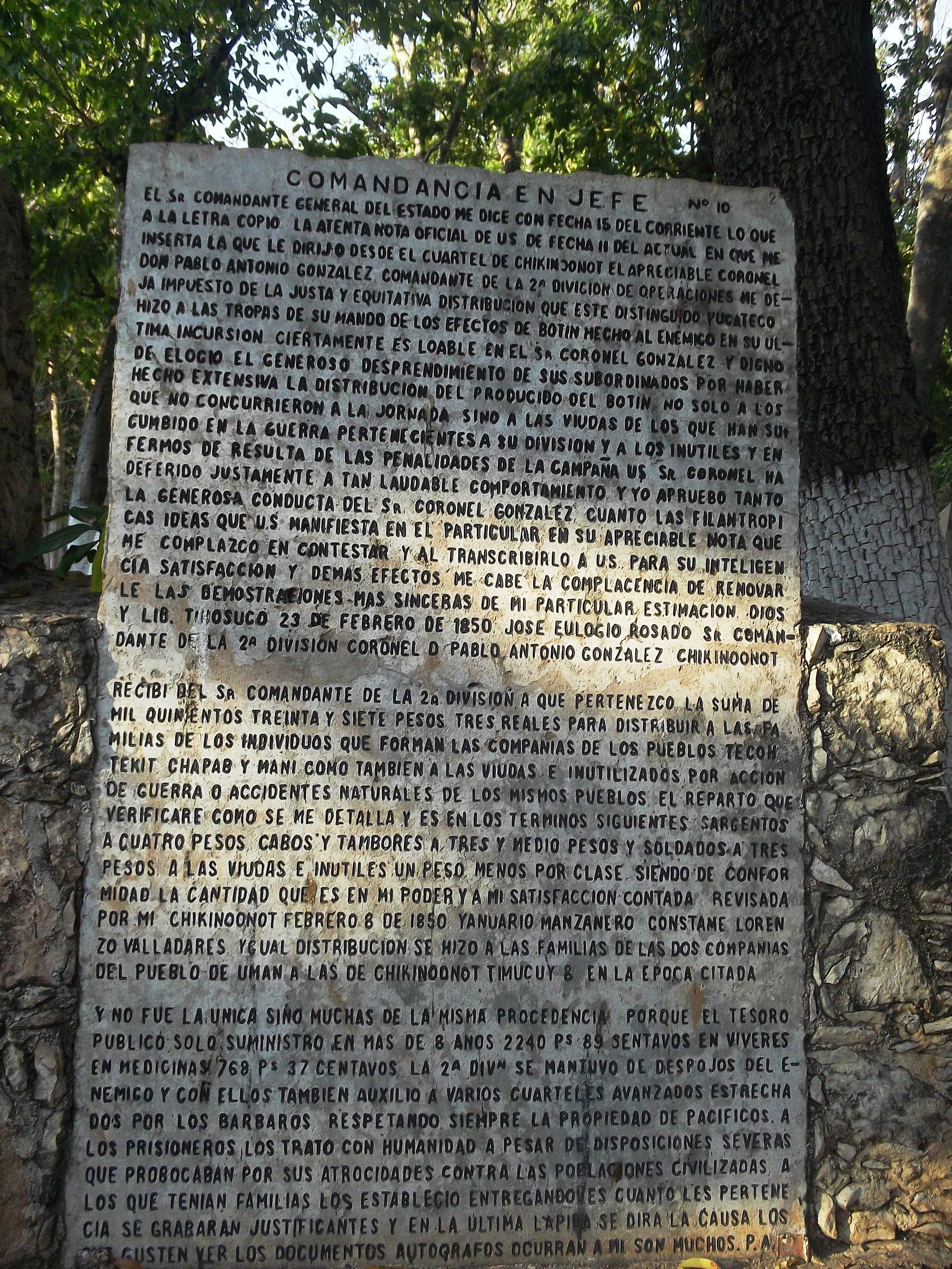 Parque Zoológico del Centenario en Mérida, Yucatán .